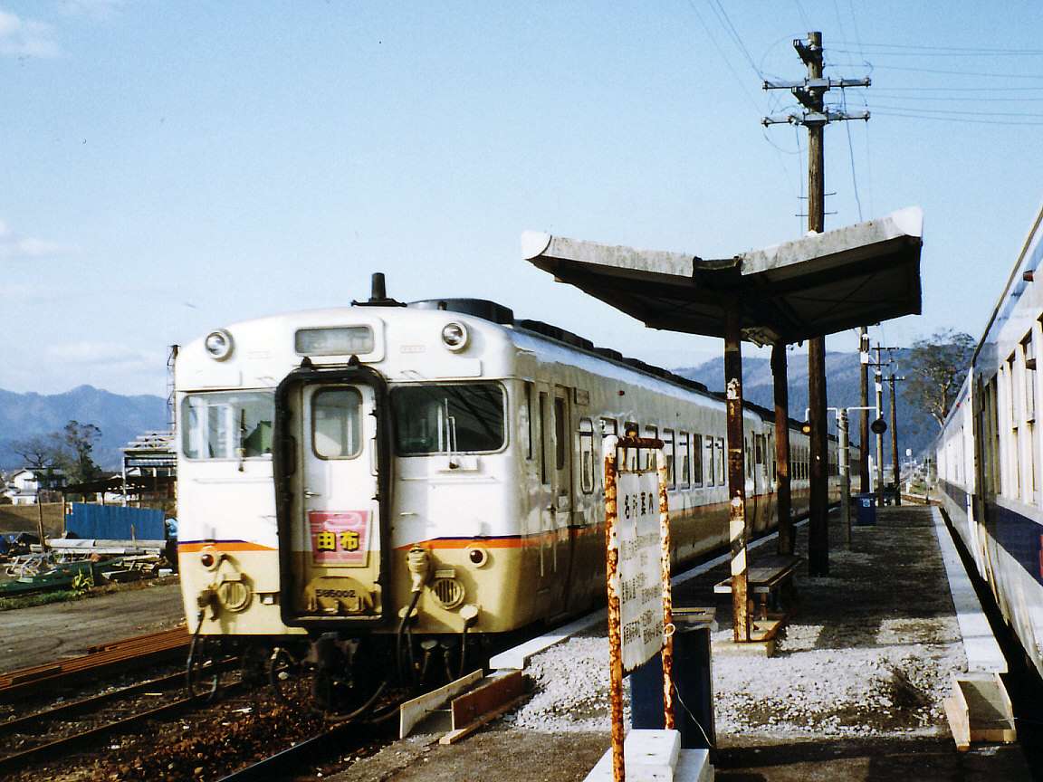 JR九州キハ58系急行「ゆふ」 光岡駅にて